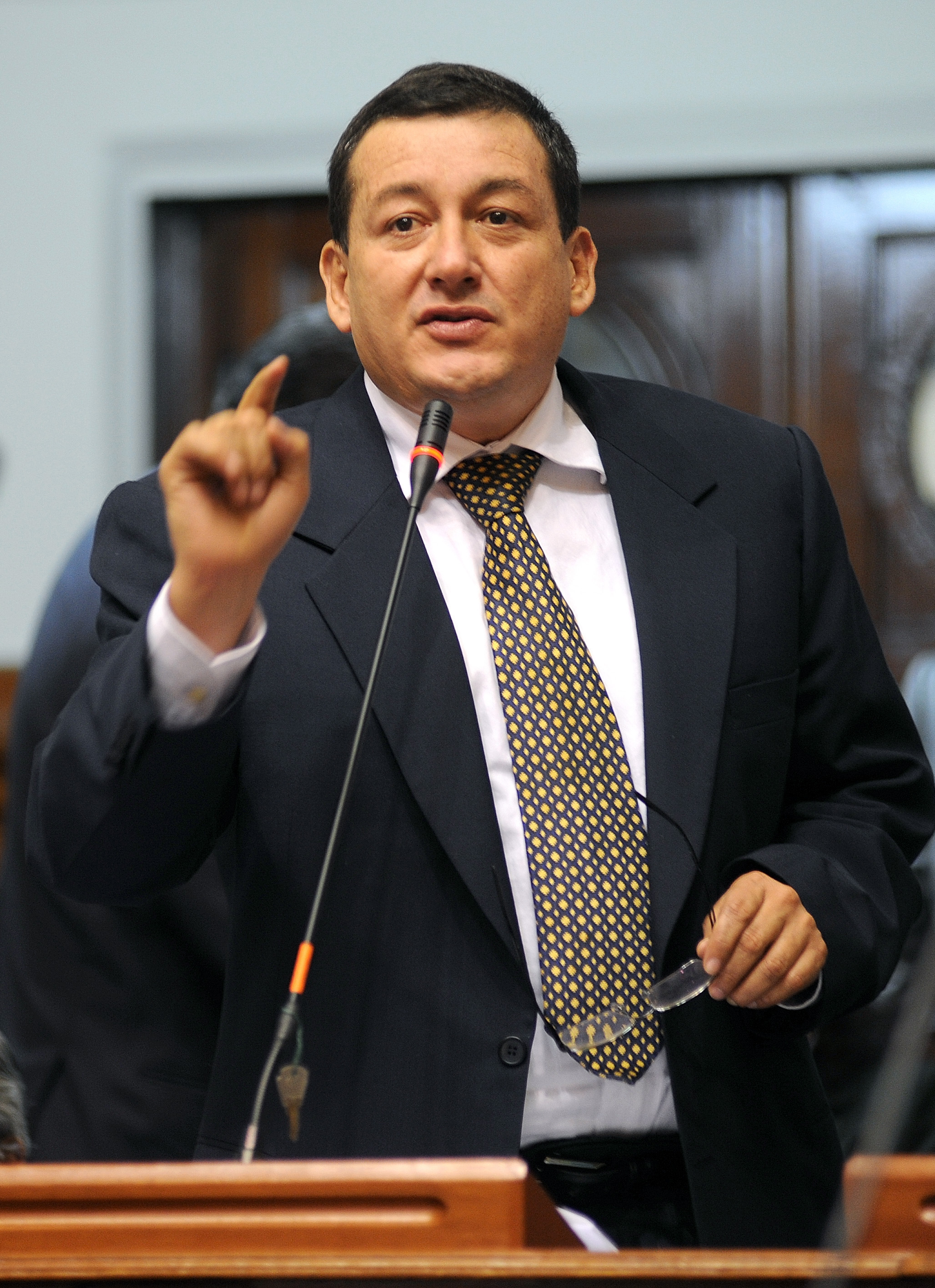 El congresista Rolando Reátegui Flores fija su posición en el debate parlamentario realizado esta tarde por el Pleno.